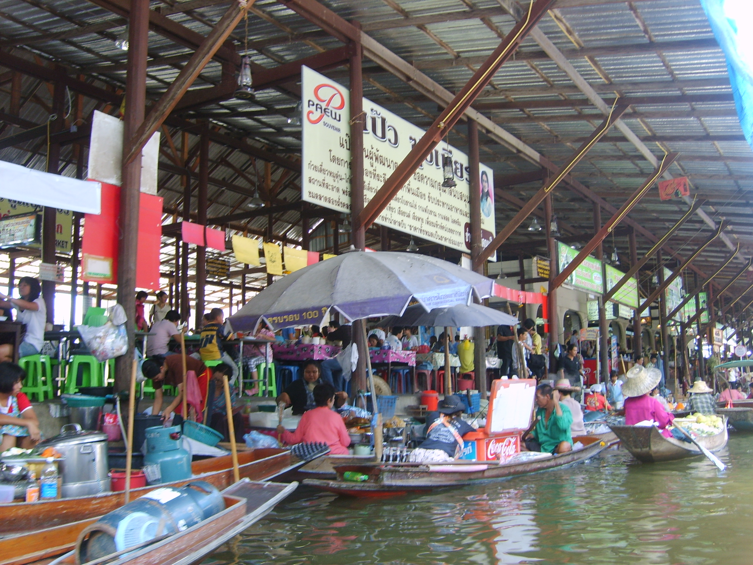 ภาพตลาดน้ำดำเนินสะดวก